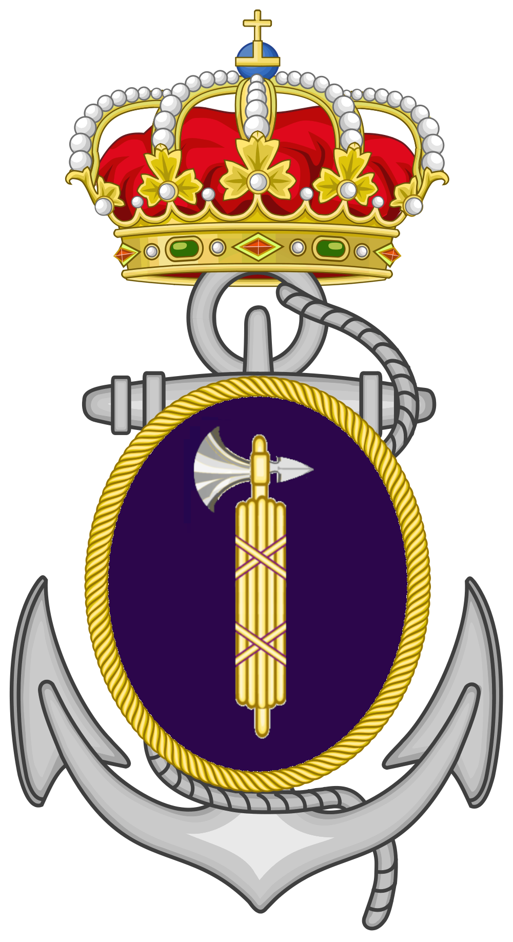 Metopa del Cuerpo Jurídico de la Armada Española